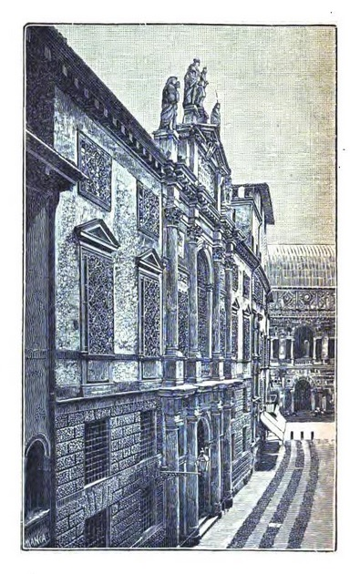 Facciata laterale del Palazzo Monte di Pietà (Vicenza), con ingresso della vecchia sede della Biblioteca civica Bertoliana.